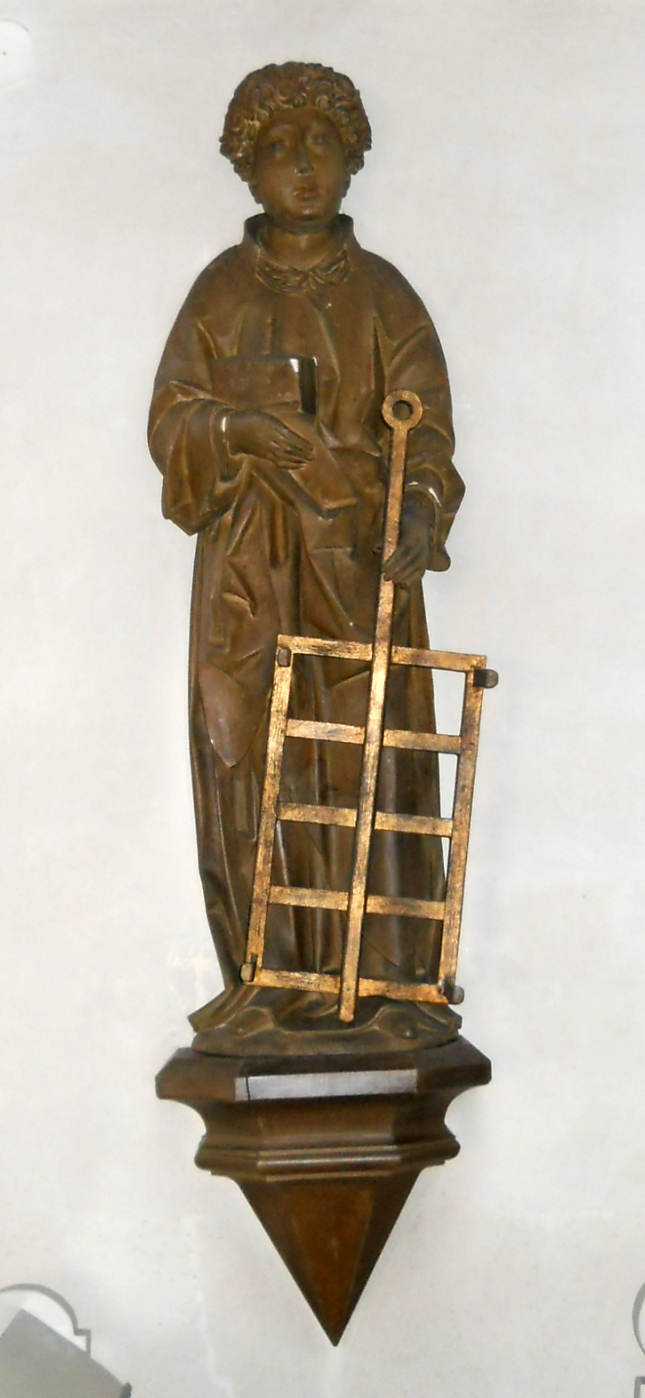 Mittelalterliche St. Laurentius-Figur in der Kirche St. Martin und Ägidius in Wald im Landkreis Weißenburg-Gunzenhausen, Bayern